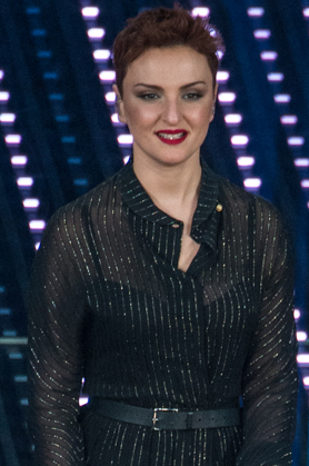 Arisa durante la serata finale del 66 Festival di Sanremo, 13 febbraio 2016